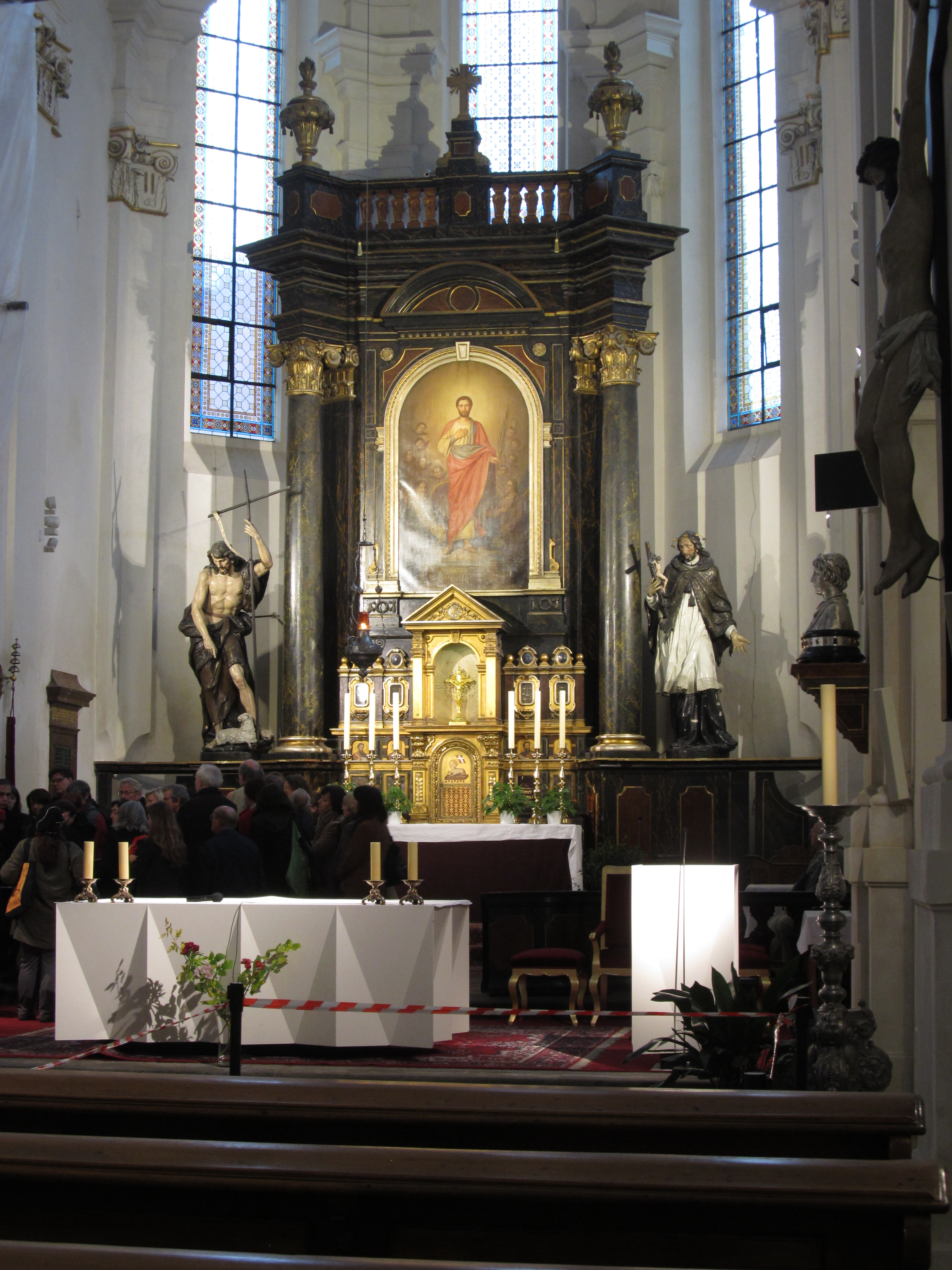 Interiér kostel sv. Haštala, Staré Město, Praha.